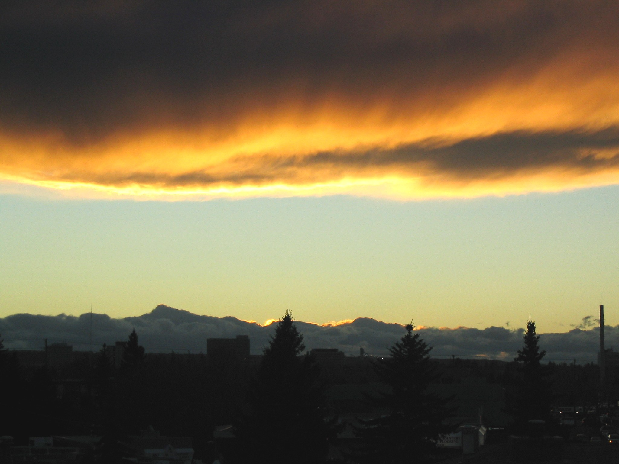 "Ĉinuka arko", tipa nubaro de la vento de Chinook en la Roka Montaro de Norda Ameriko. La koloroj videblaj en ĉi tiu ĉinuka arko estas ofte frapaj. Kutime la koloroj ŝanĝiĝas dum la tago; oni vidas flavajn, oranĝajn, ruĝajn, kaj rozajn nuancojn je sunleviĝo kiuj ŝanĝiĝas al grizoj tagmeze kaj poste al oranĝe flavaj koloroj tuj antaŭ la sunsubiro. La koloroj de ĉi tiu bildo ne estis ŝanĝitaj dum prilaborado; ofte la arko aspektas ĝuste ĉi tiel.